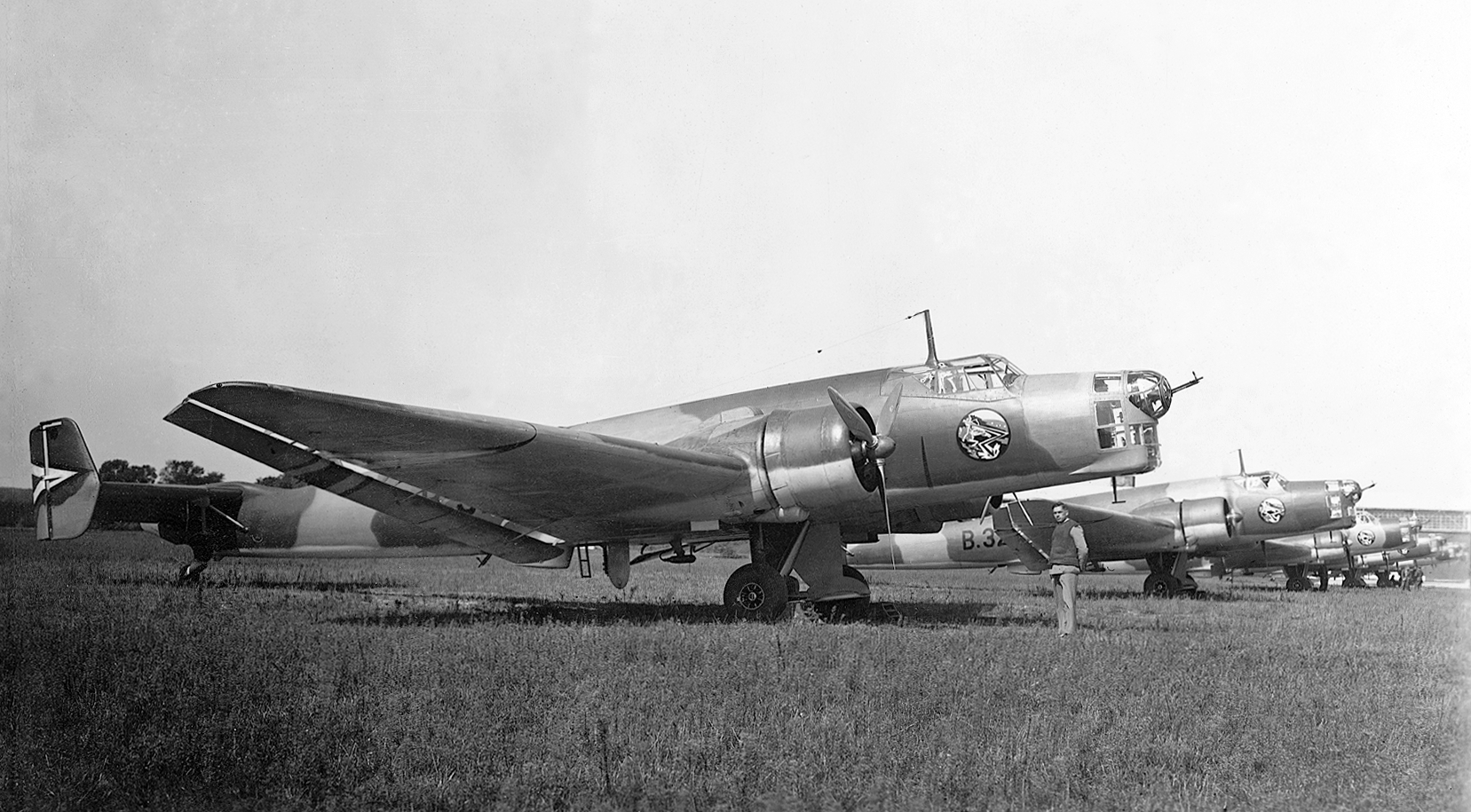 repülőtér, Junkers Ju-86 repülőgépek. Location: Hungary Tags: Royal Hungarian Air Force, Junkers-brand, airplane, airport, transport, military, Gerrman brand Title: repülőtér, Junkers Ju-86 repülőgépek.